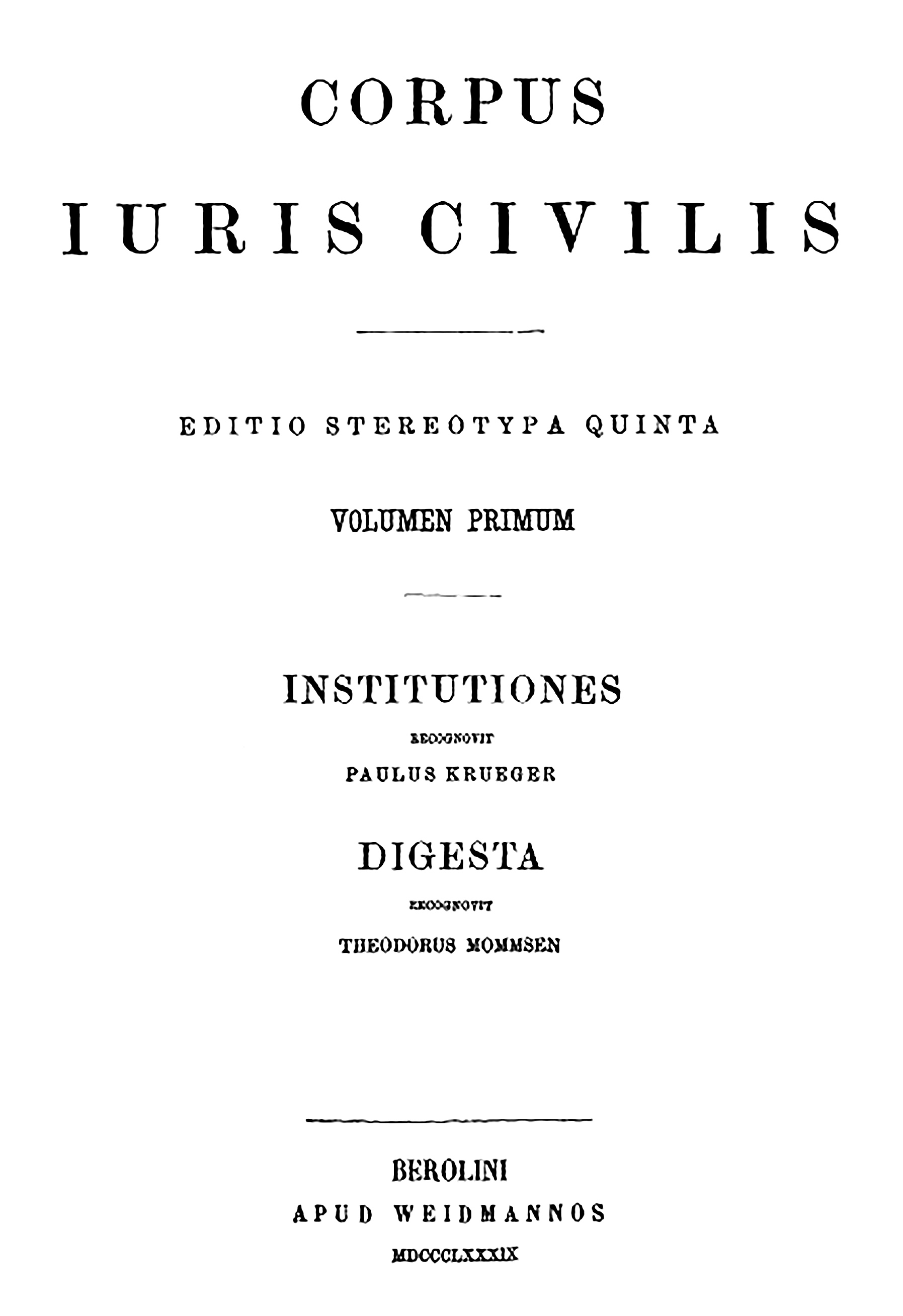 Титульный лист издания Corpus iuris civilis